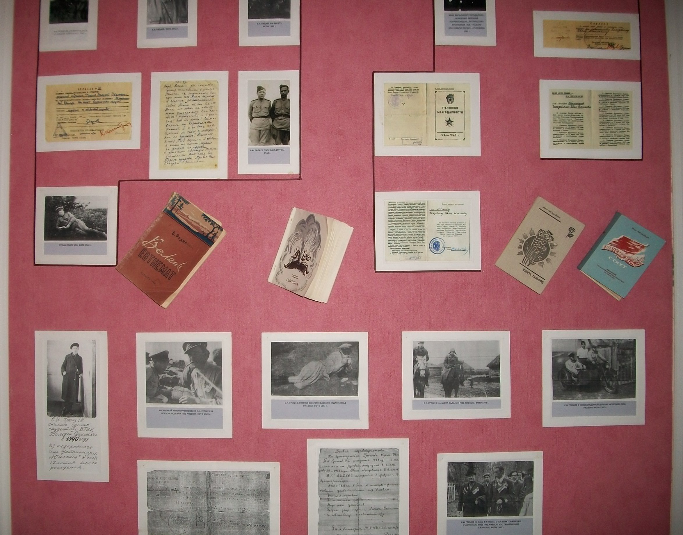 Музей А. И. Полежаева в Саранске. Один из стендов, посвящённых мордовским писателям.